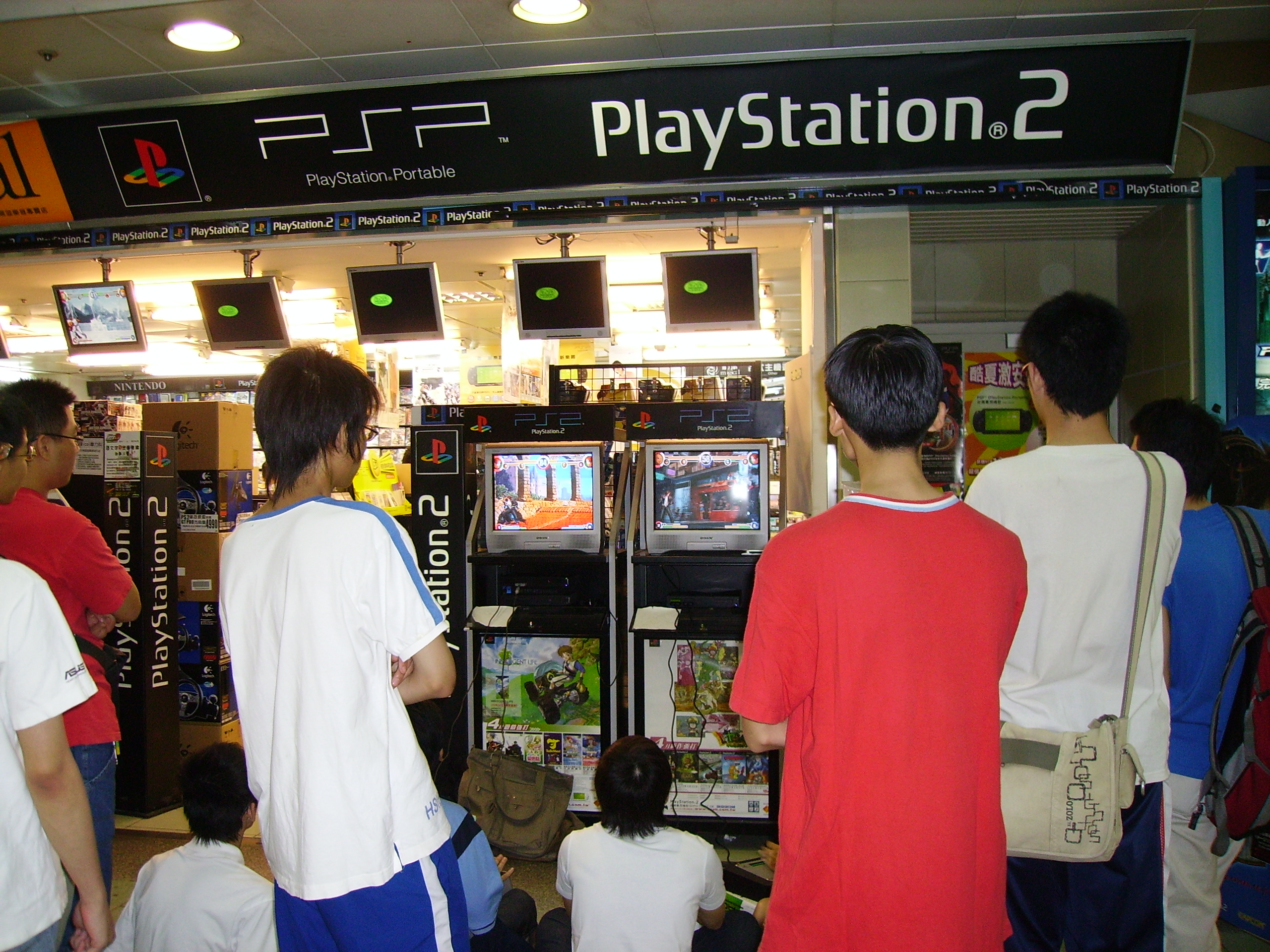 中文（台灣）: 臺北地下街的PS2玩家。